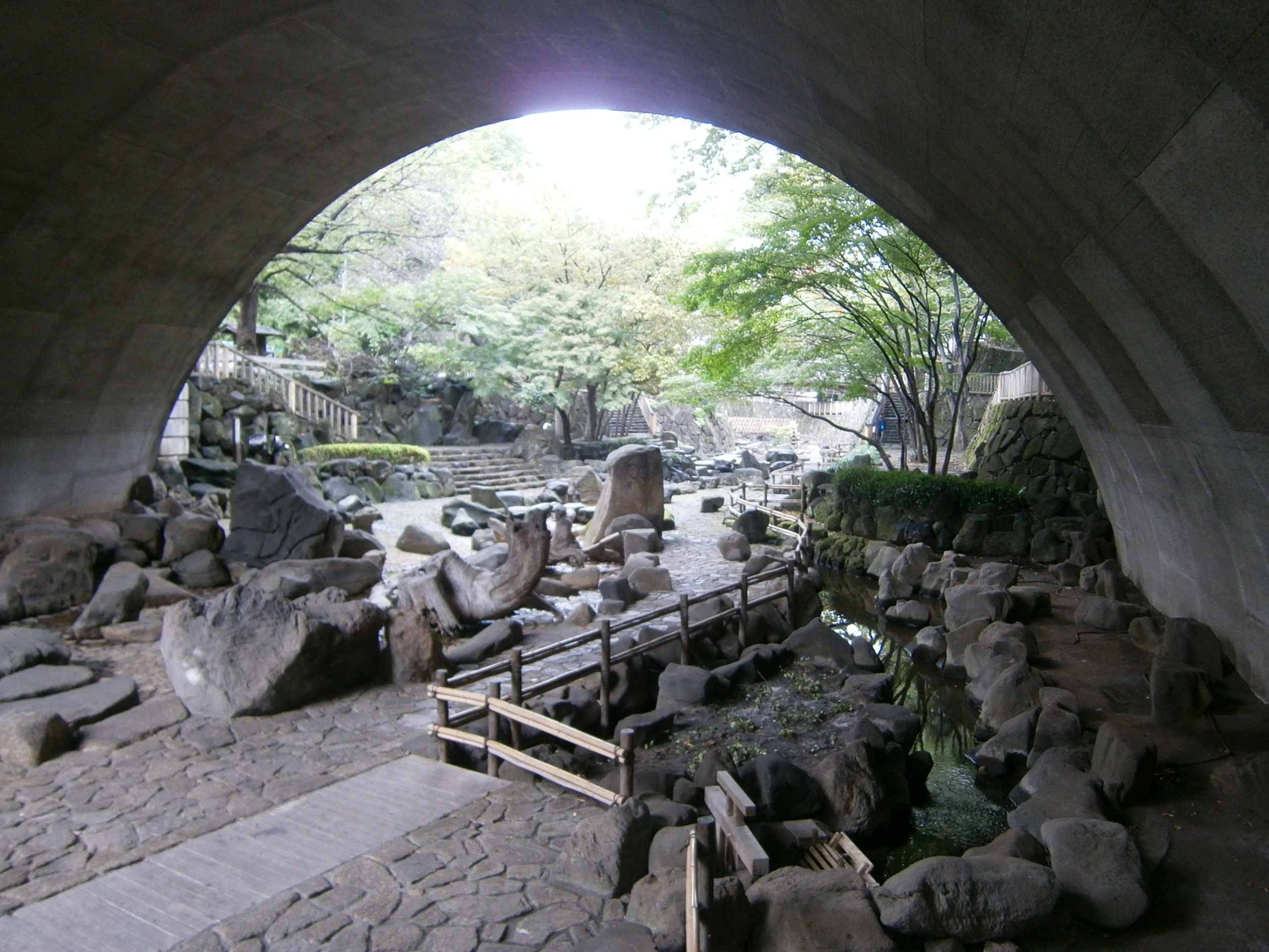 2 Chome Takinogawa, Kita-ku, Tōkyō-to 114-0023, Japan